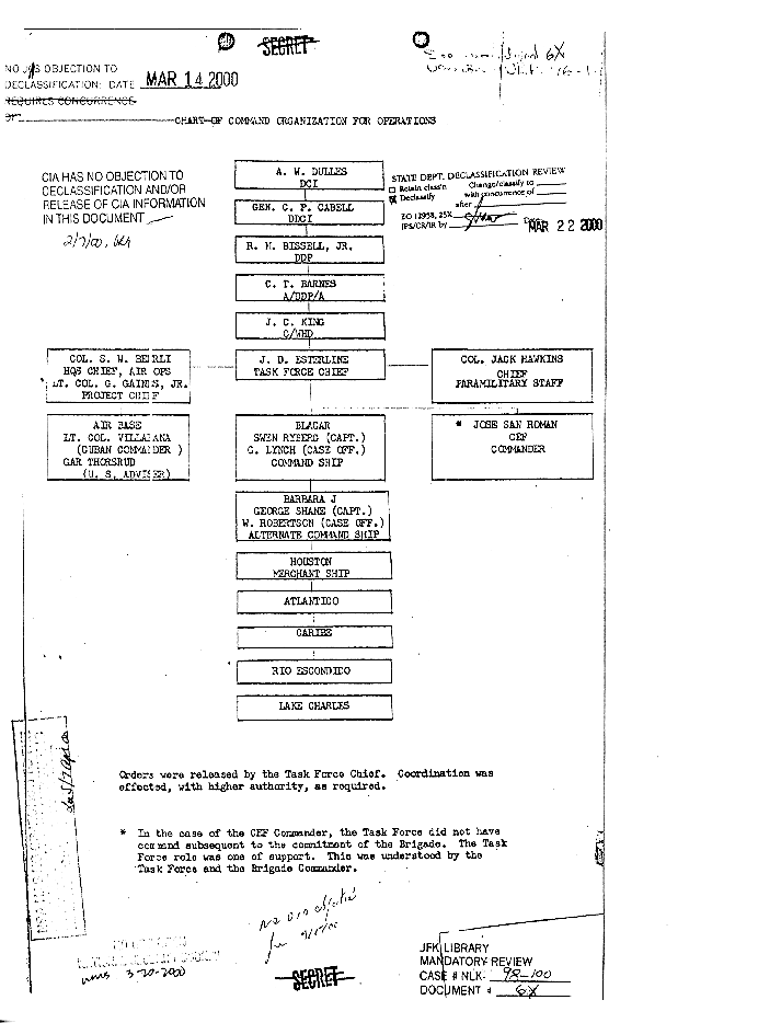 Bay of Pigs Command Chart